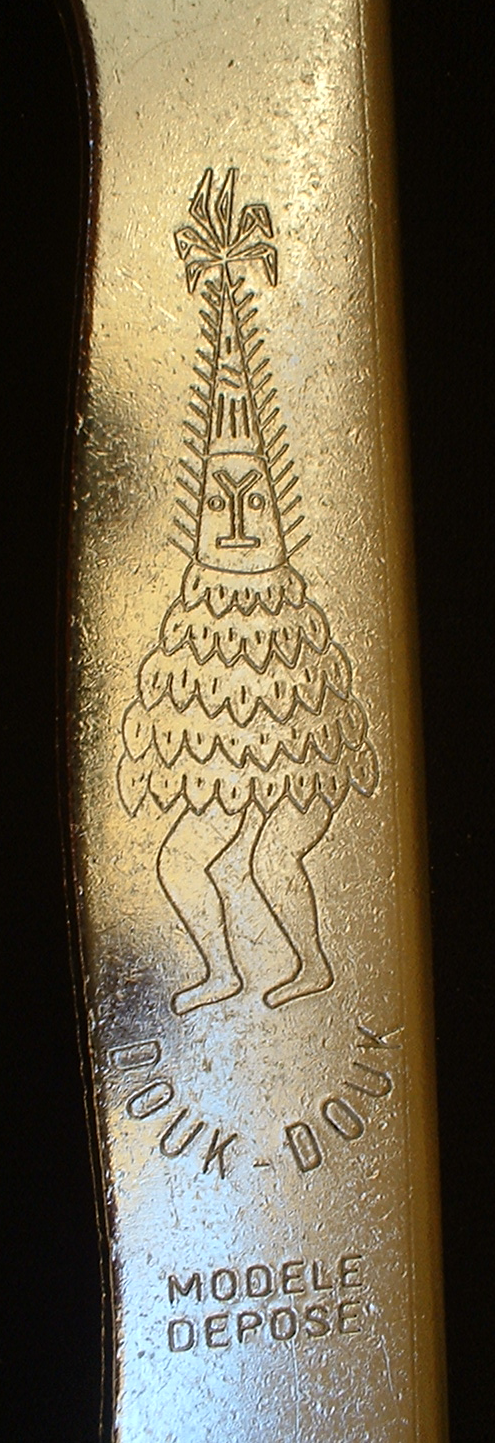 image de "Douk douk" gravée sur le manche d'un couteau Douk douk